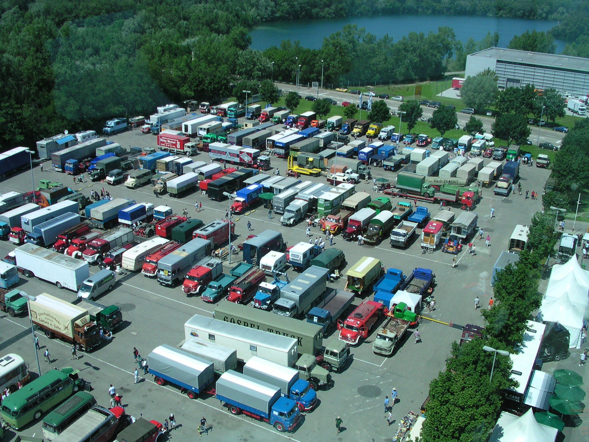 Ausblick auf das LKW-Werk aus einem Korb, den in Wörth am Rhein beim Oldtimer-Treffen bei Daimler-Chrysler ein Kran hochgezogen hat.